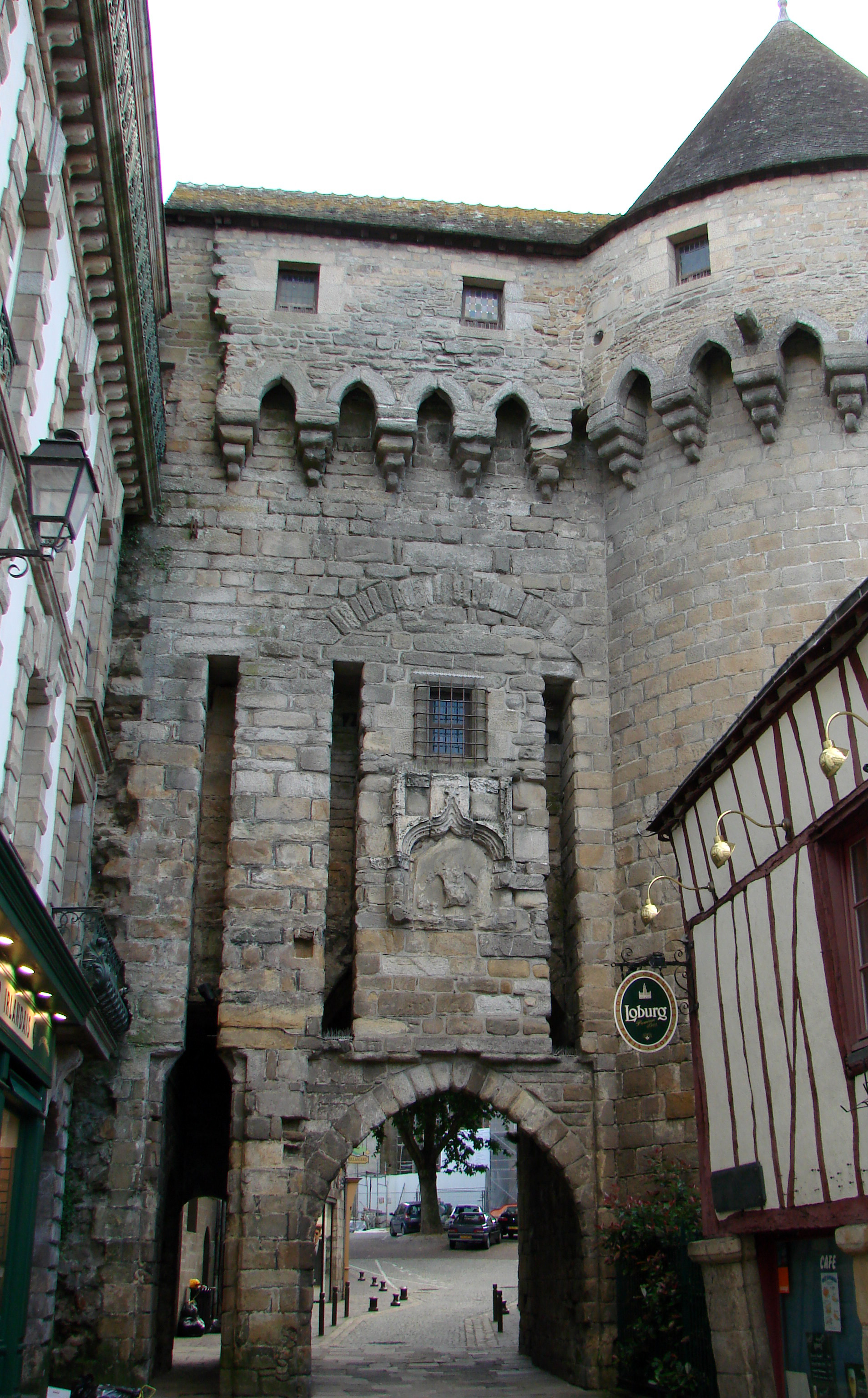 Porte-prison,XIIIème-XVème siècle,nommée porte Saint-Patern au Moyen-âge.